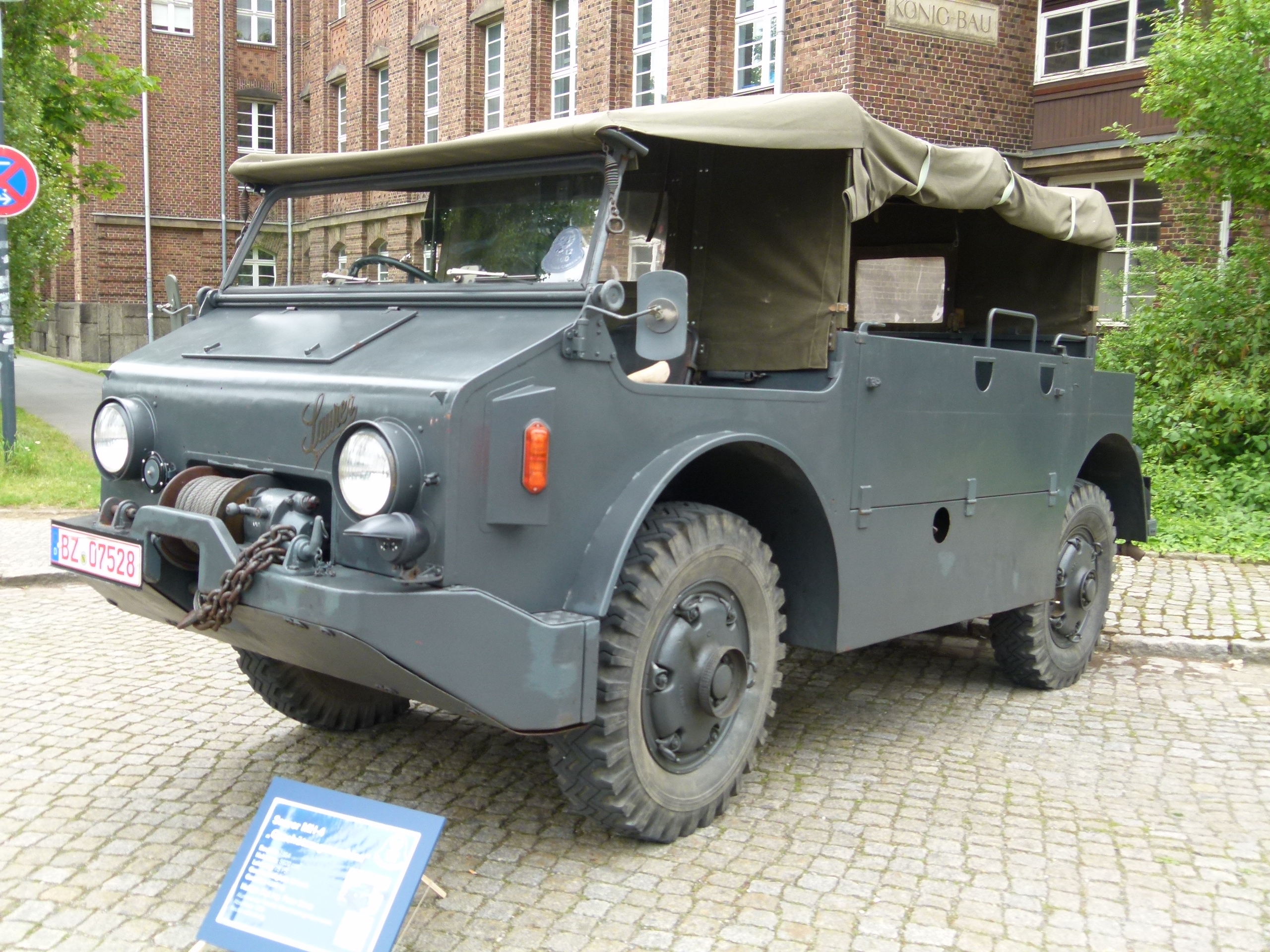 Saurer MH-4 - Geschützzugmaschine, 1954, (1. TUD Campus Classics, 9.6.2012)